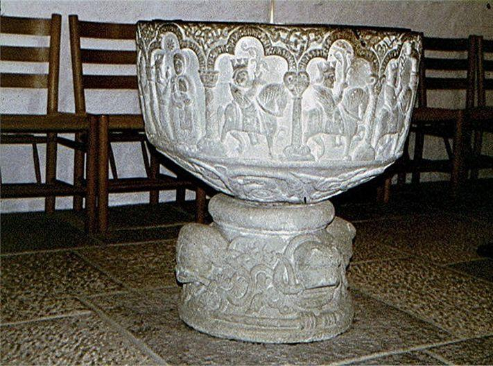 Aa Kirke på Bornholm